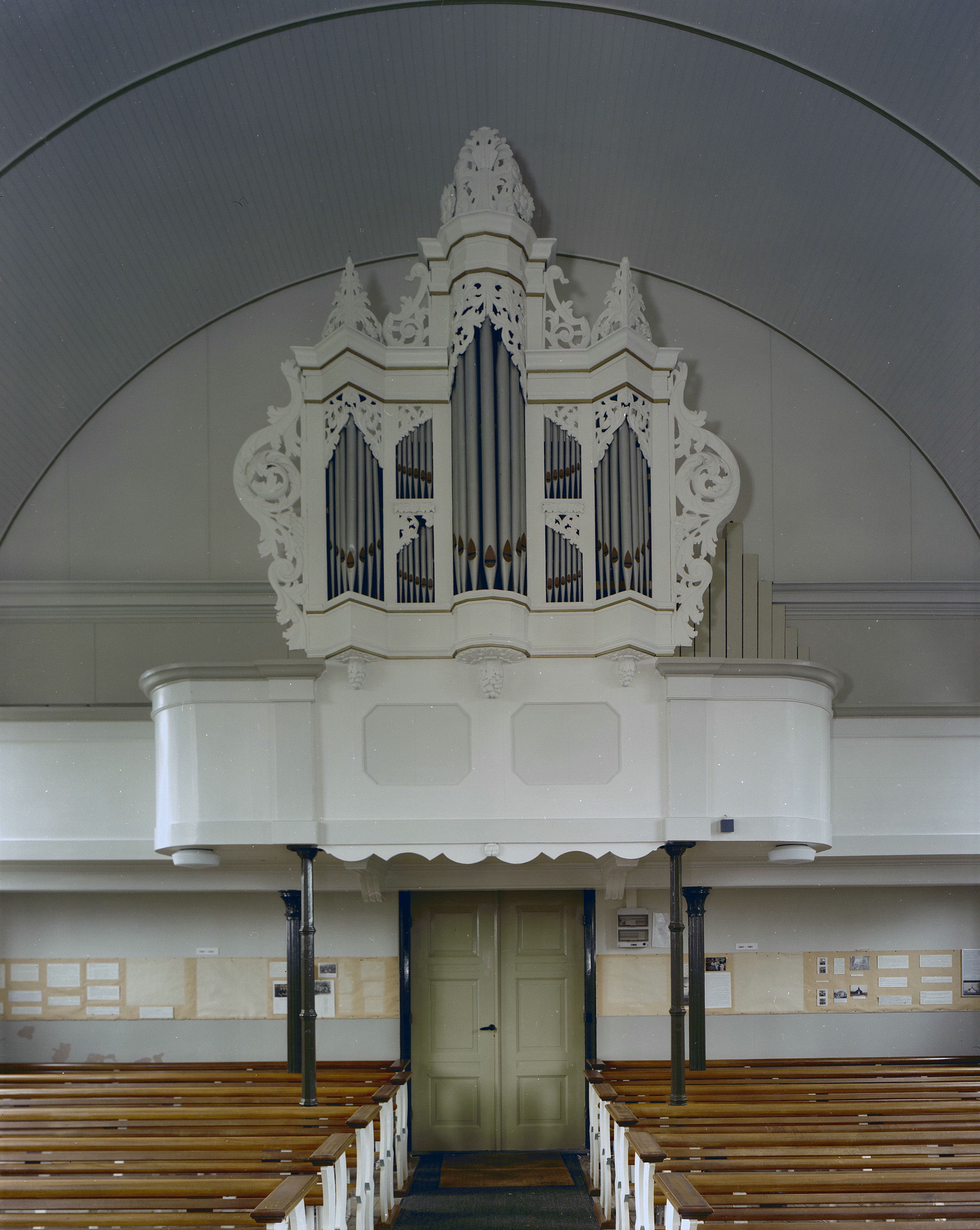 Nederlands Hervormde Kerk: Interieur, aanzicht orgel, orgelnummer 286 (opmerking: Gefotografeerd voor Het Historische Orgel in Nederland 1726-1769, bladzijder 89)